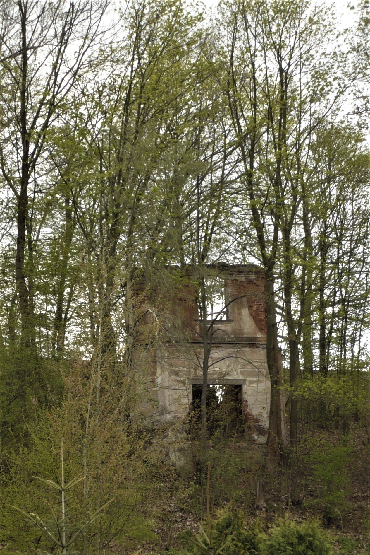 Oranżeria w Piszkowicach